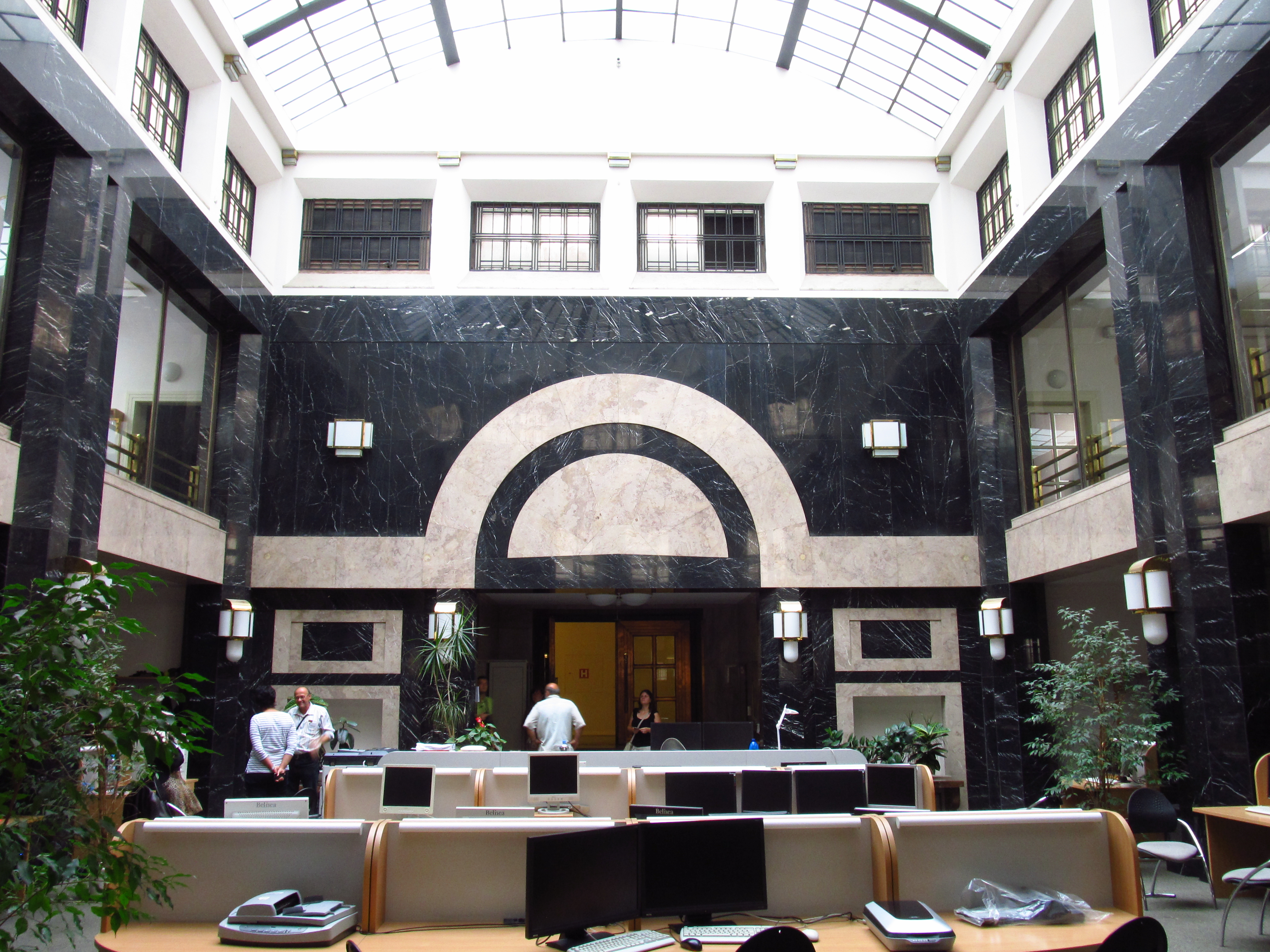 Bankovní dvorana Ústřední státní pokladny z let 1922-27 podle projektu A. Špalka v bývalém jesuitském profesním domě. V současnosti využívána jako počítačová laboratoř MFF UK. Zpřístupněna během Dnů evropského dědictví 2013.